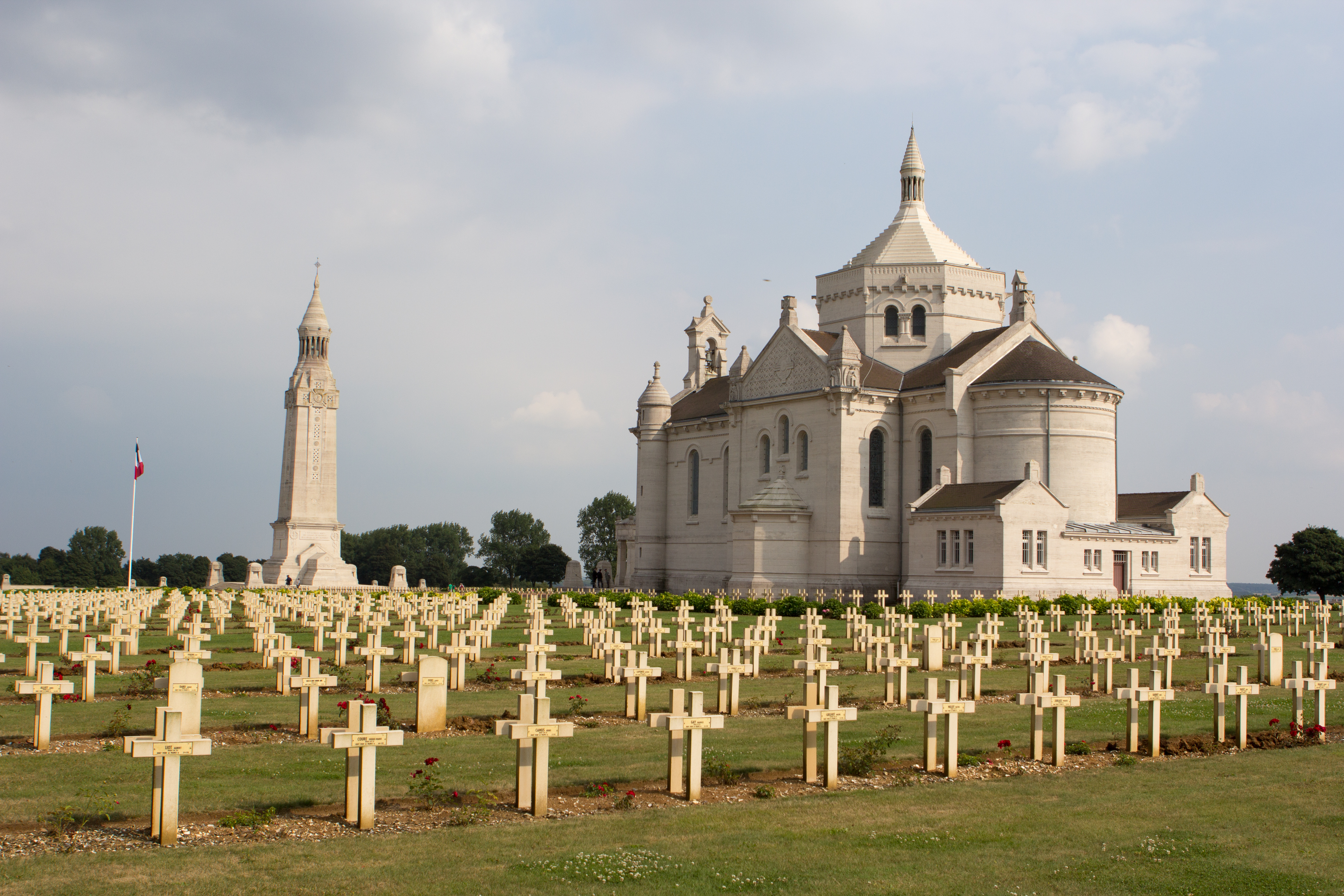 Nécropole nationale de Notre-Dame-de-Lorette / Ablain-Saint-Nazaire, Pas-de-Calais, France